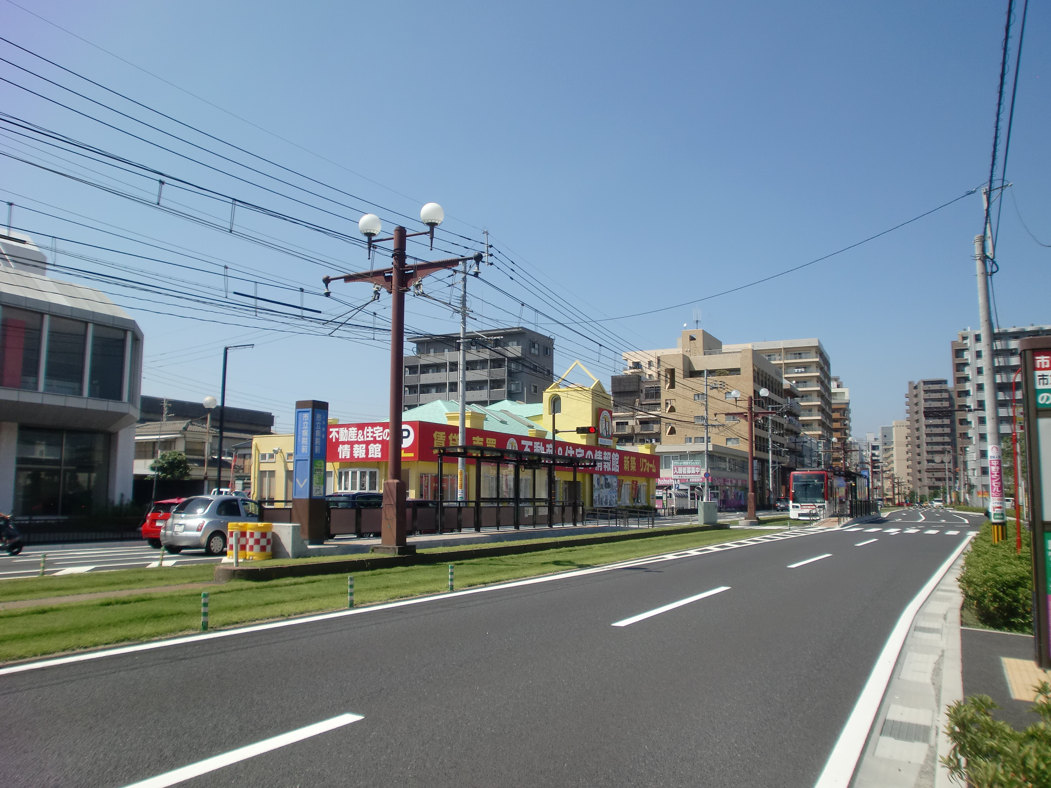 2015年5月1日に移転した市立病院前停留場（旧たばこ産業前停留場）の画像。